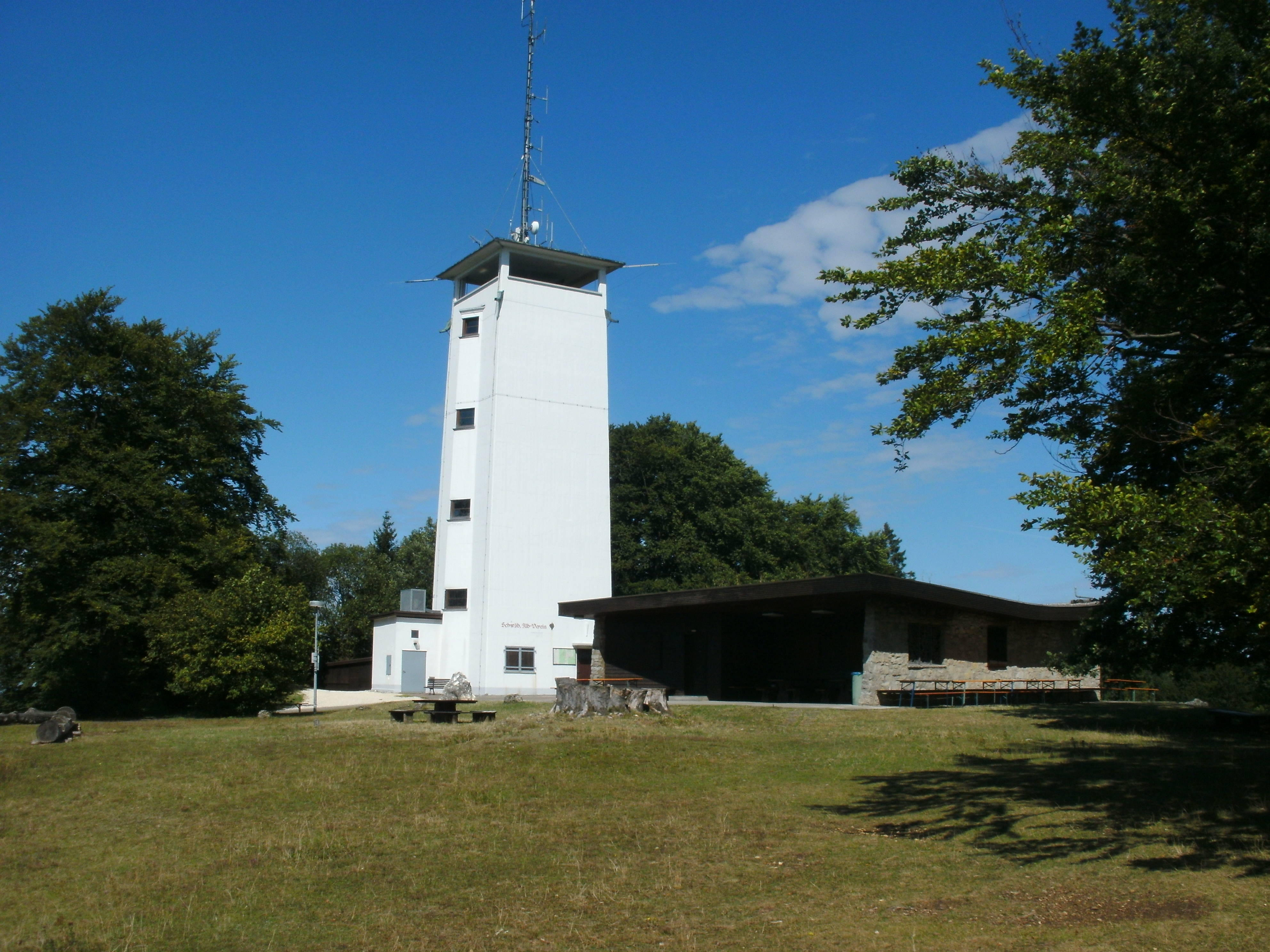 Aussichtsturm und Wanderheim des Schwäbischen Albvereins auf dem Volkmarsberg bei Oberkochen